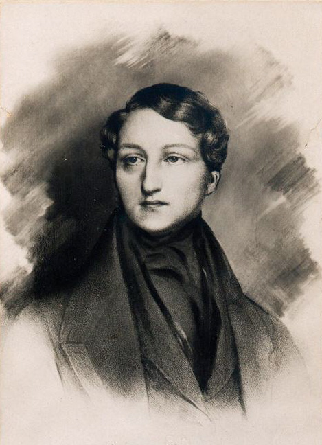 Portrait de Sigismund Thalberg, carte postale n° 631 non datée éditée par Breitkopf & Härtel à Londres d'après une lithographie par Henri Grévedon